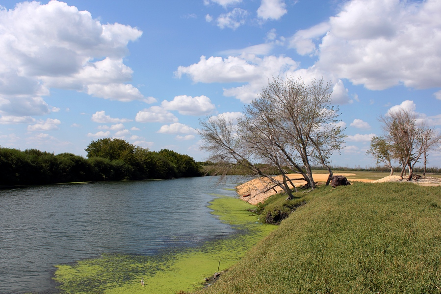 Река Нура в среднем течении